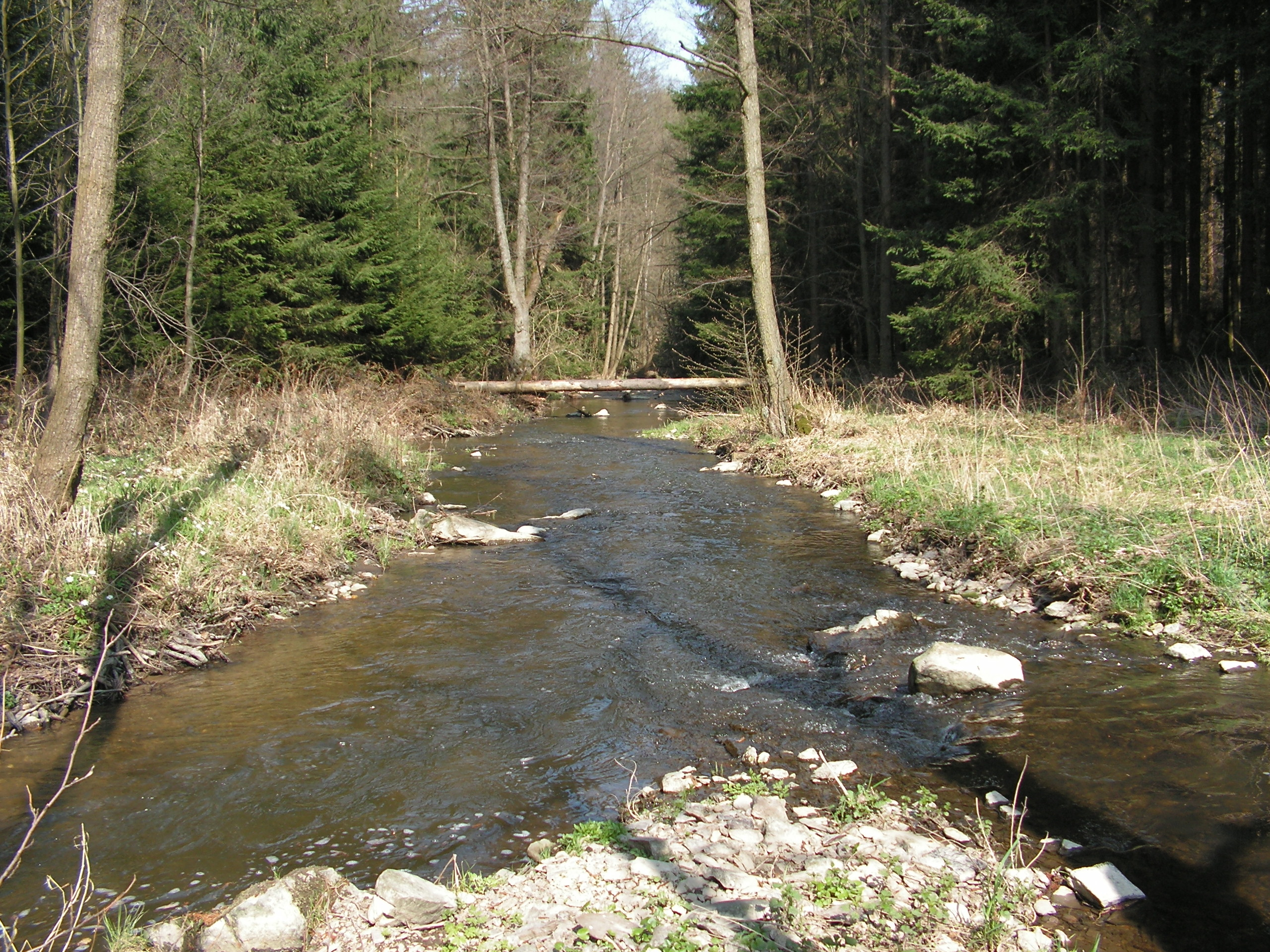 Soutok Jánského (Klejnárka) a Vranidolského potoka u Doudovského mlýna.